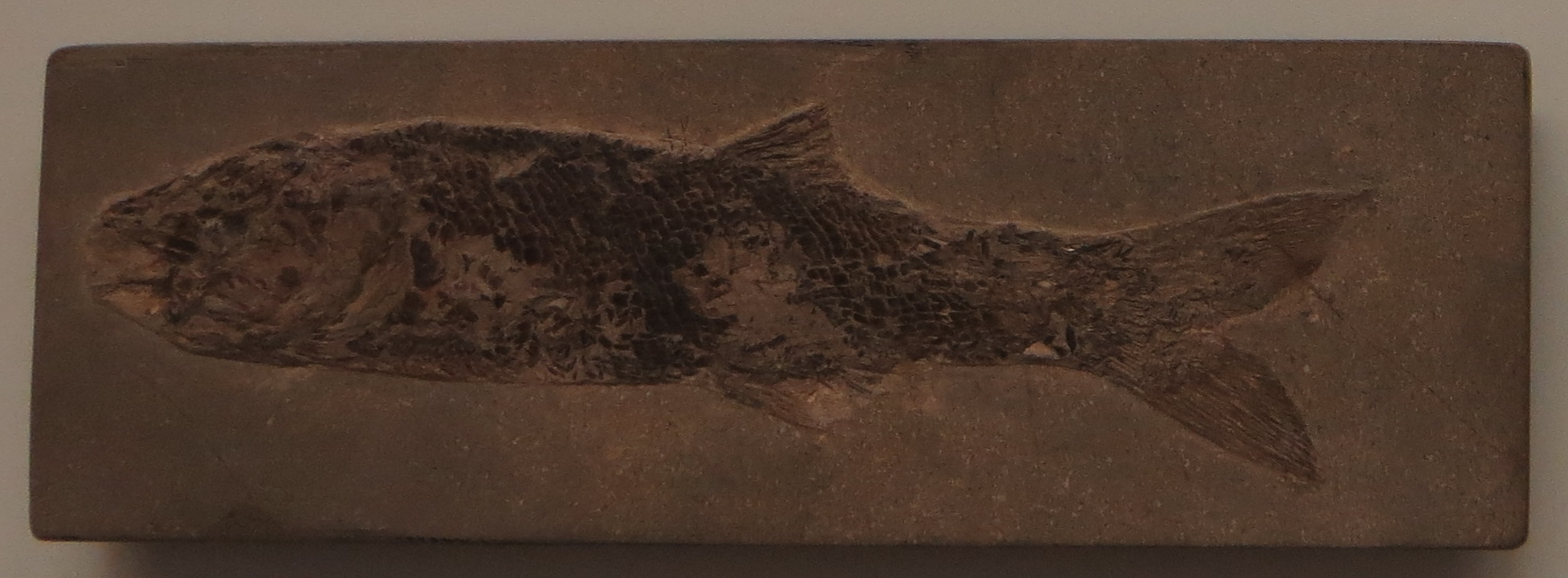 Fossil of Pholidophorus - Took the picture at Museum am Lowentor, Stuttgart